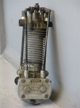 Stafford Auto-Scooter engine